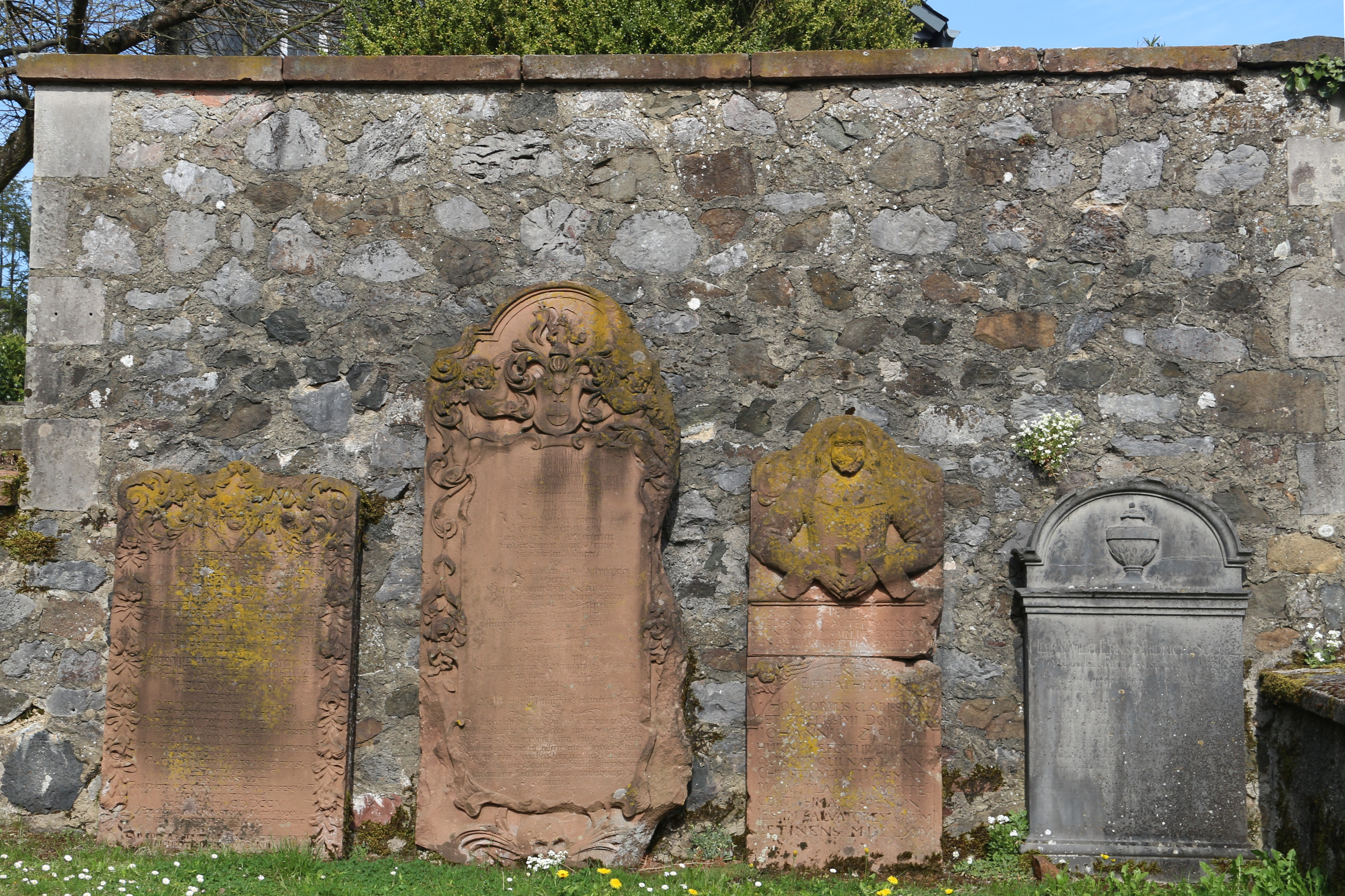 Königsberg